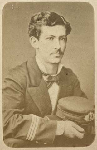 Pedro Segundo Regalado Videla Ordenes (Andacollo, 14 de agosto de 1854 — Iquique, 21 de mayo de 1879) Cirujano y marino chileno.